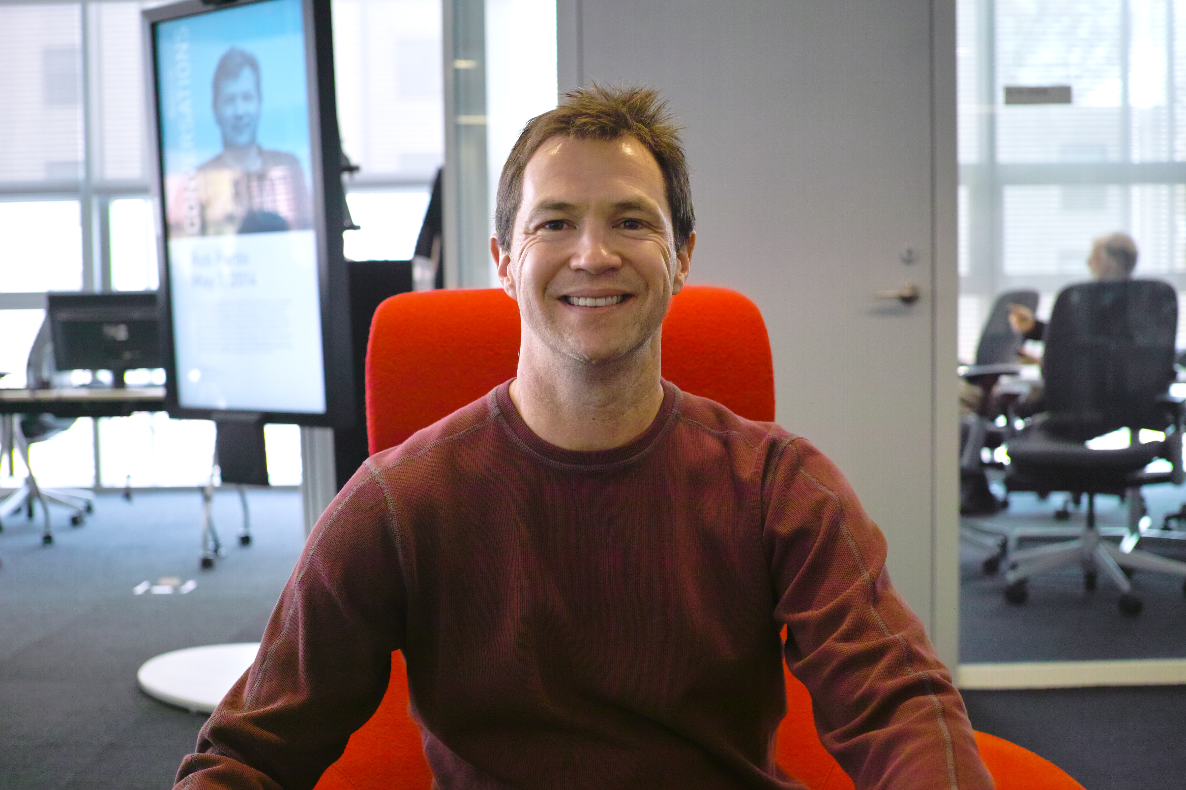 Rob Pardo, CCO of Blizzard